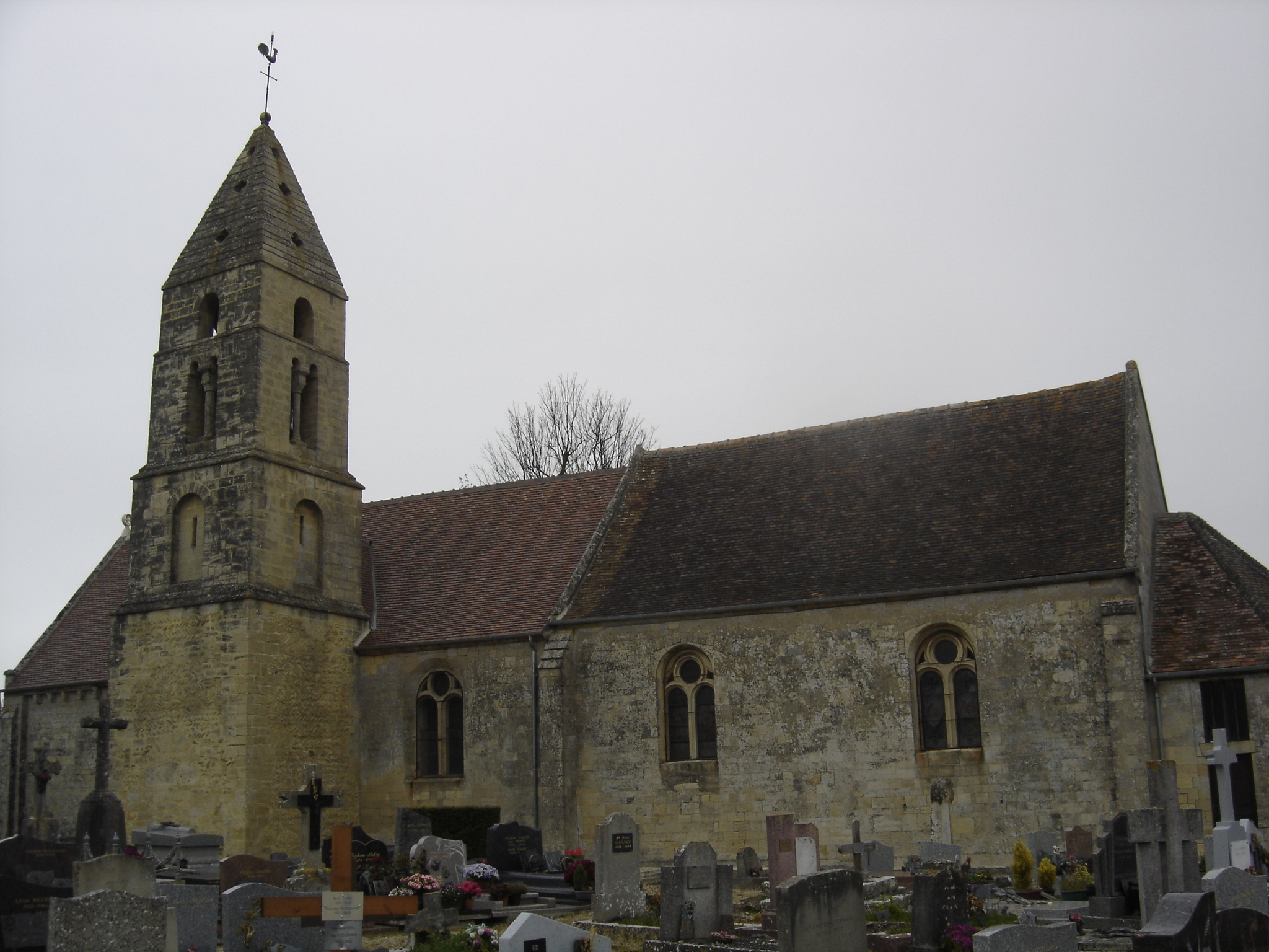 l'église Saint-Martin des XIè et XIVè siècles